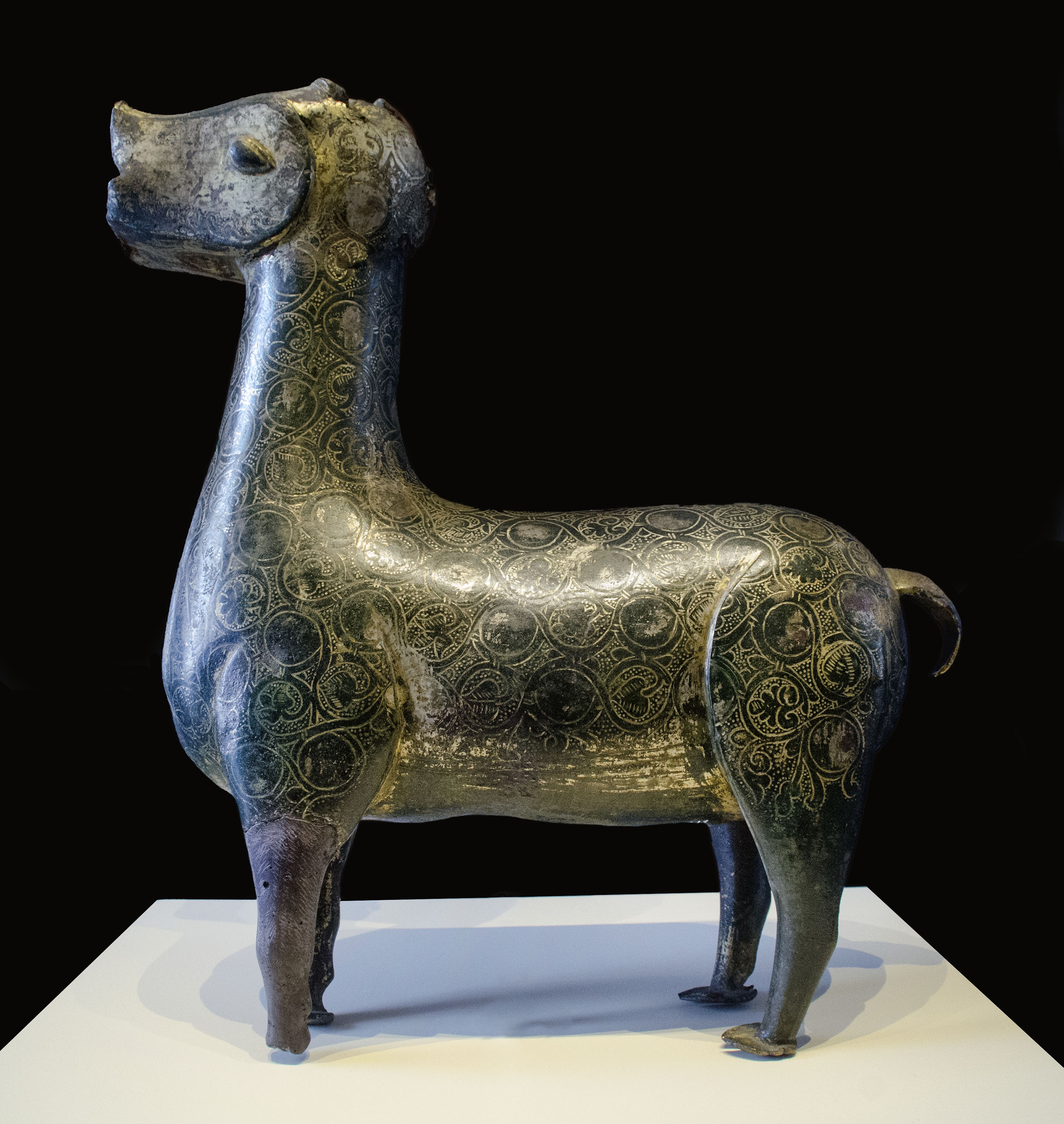 Formó parte de una fuente en Madīnat al-Zahrā' (‘la ciudad brillante’), edificada por orden de Abderramán III en el siglo X a unos km de la actual Córdoba.